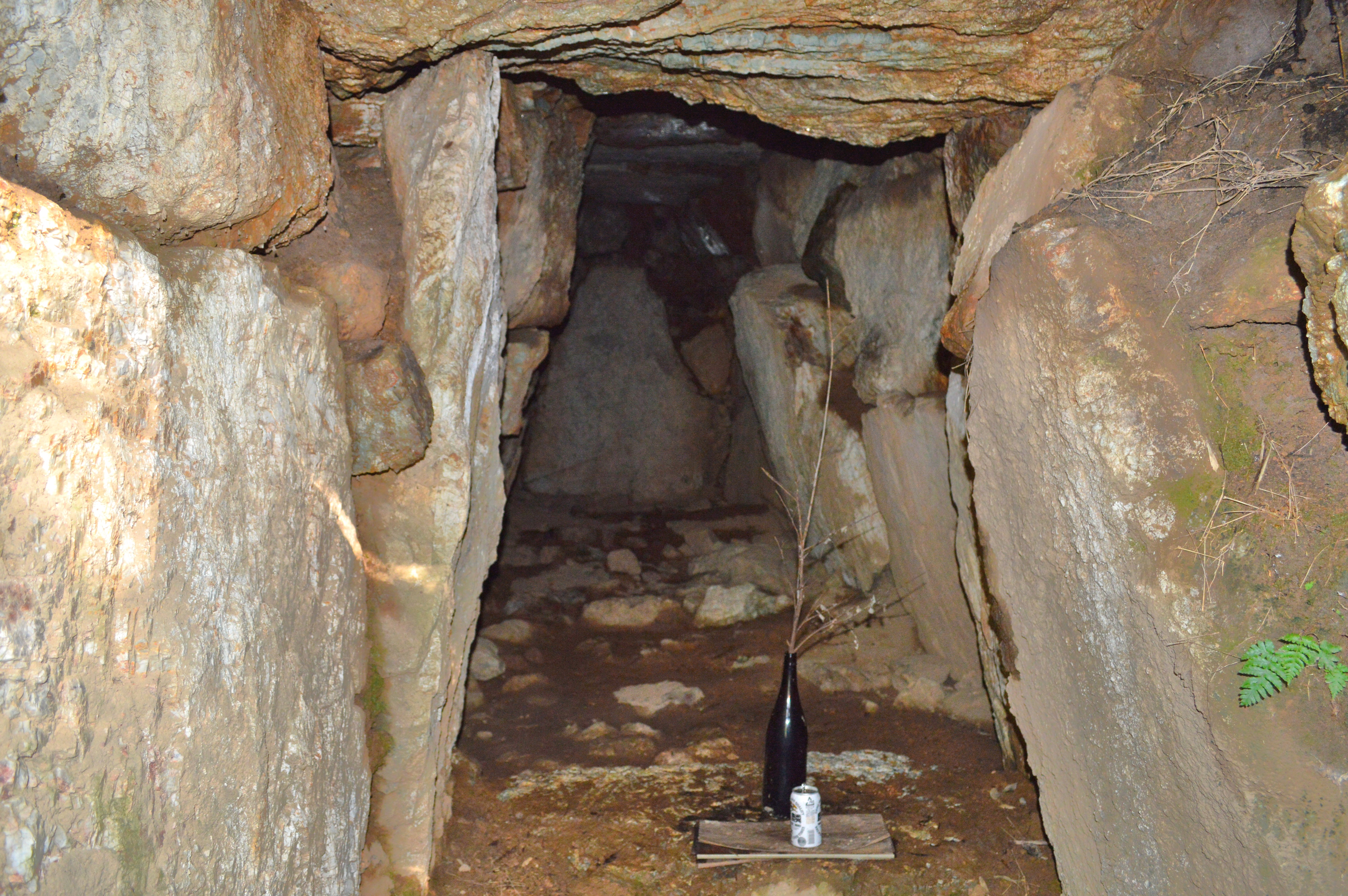 小蓮古墳 (南国市) 石室内部